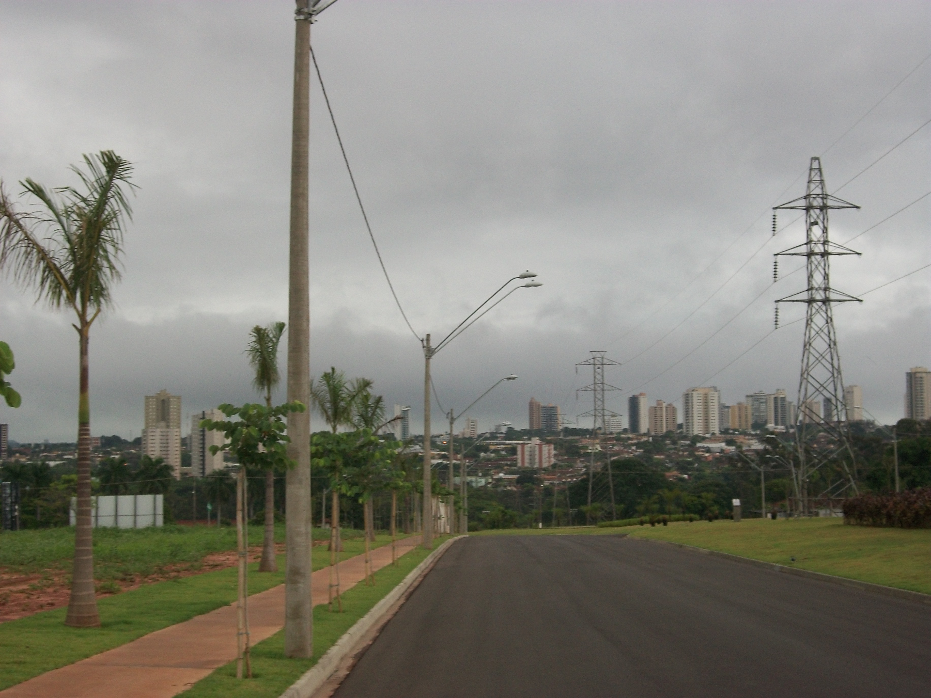 Vista de Araçatuba a partir da Zona Leste